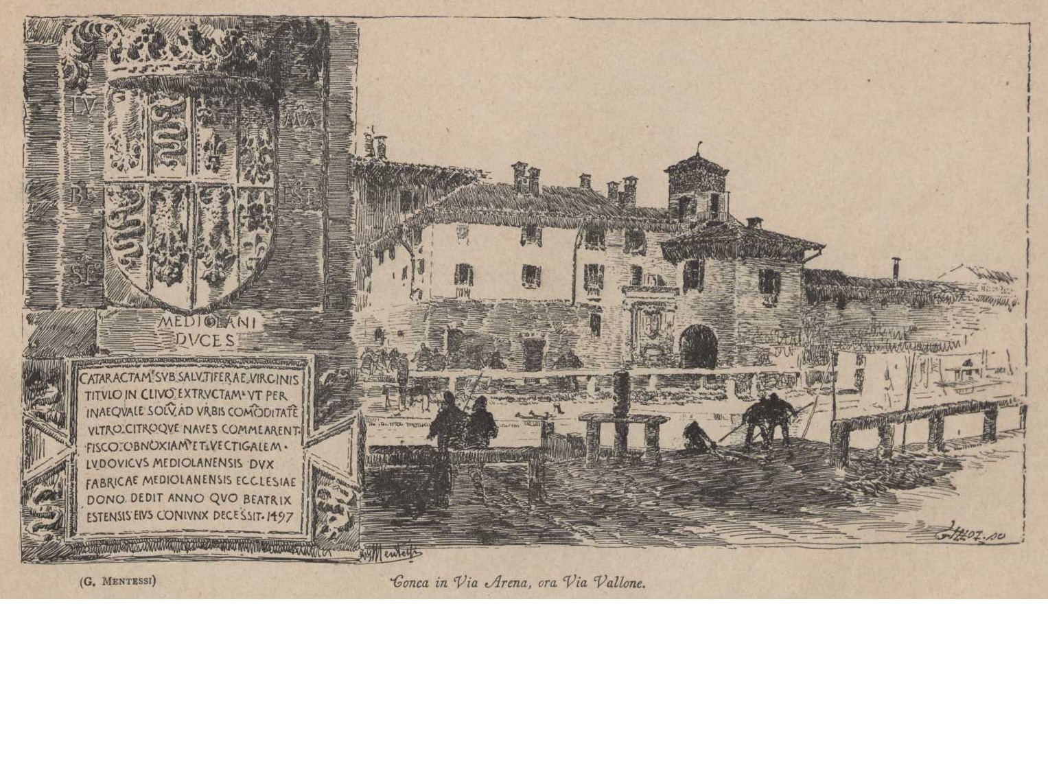 Conca in via Arena tratto da l naviglio : strenna del Pio Istituto dei Rachitici di Milano